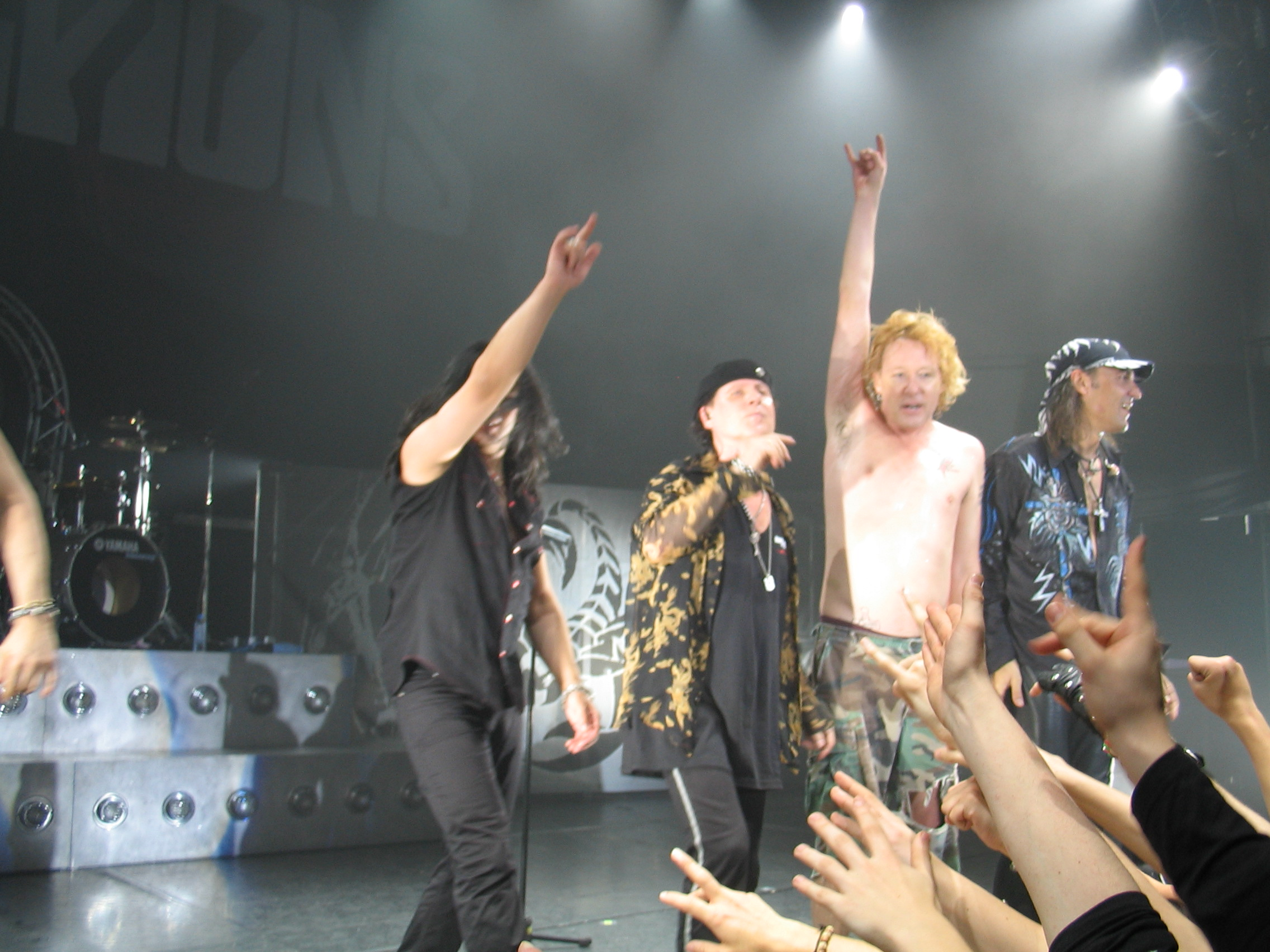 Matthias Jabs, James Kottak, Klaus Meine and Ralph Rieckermann of Scorpions.